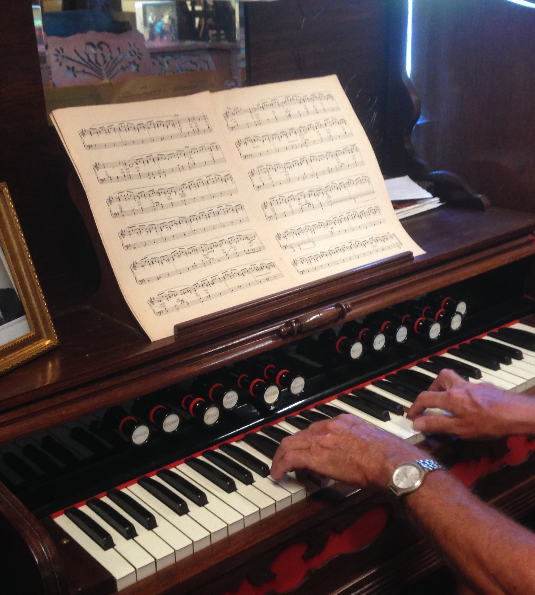 Harmonium Museum in Paasloo, Overijssel, Netherlands